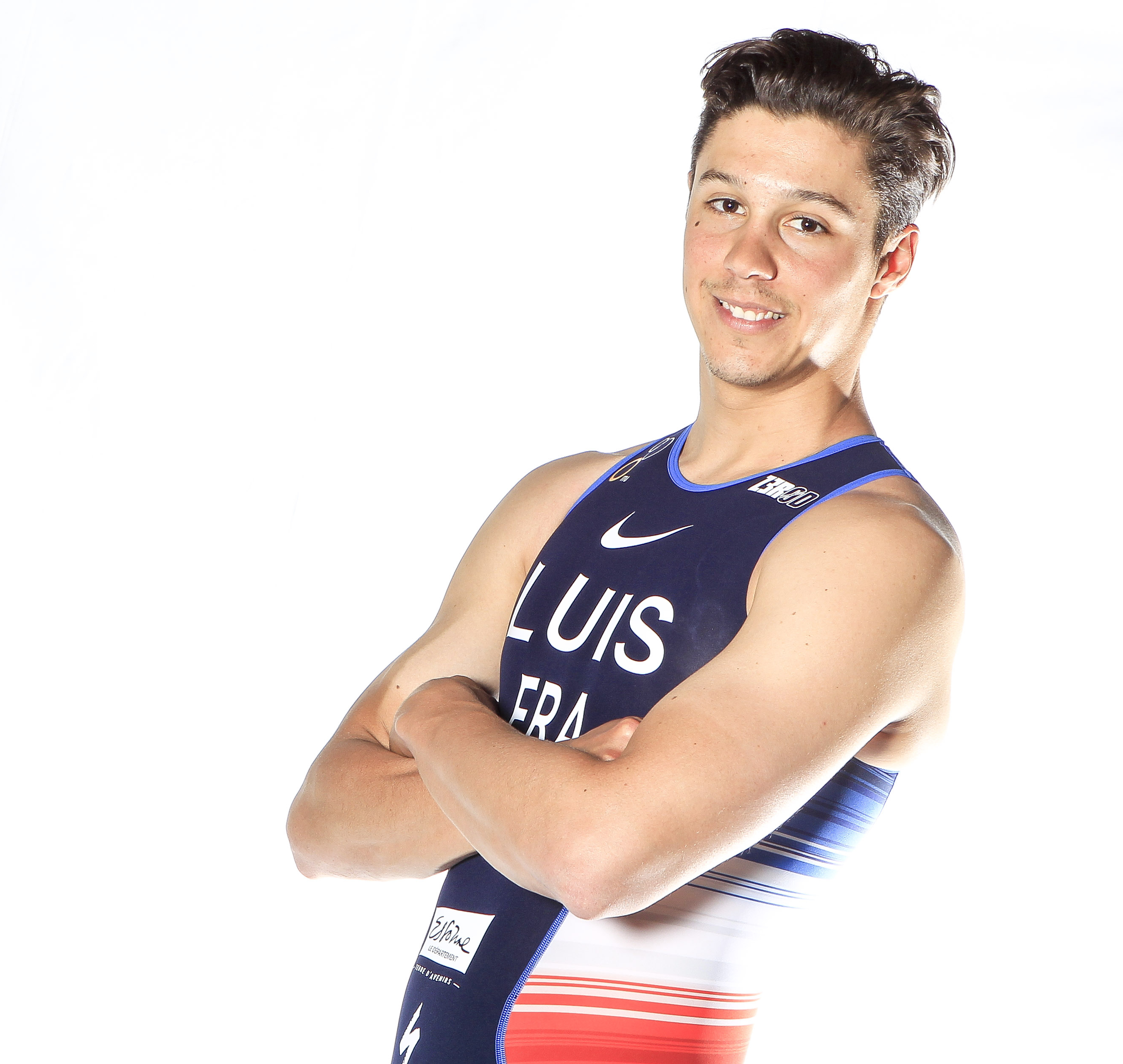 Vincent Luis, équipe de France de triathlon